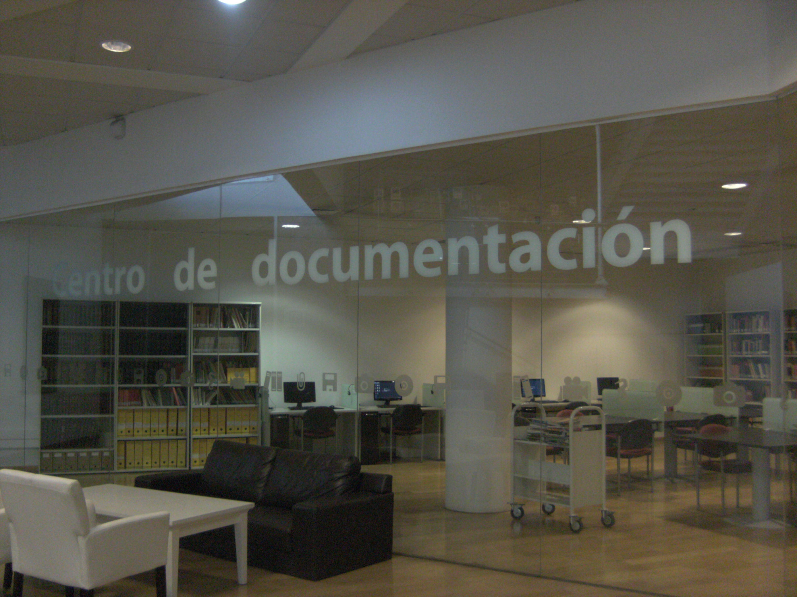 Aspectos del Museo de la Memoria y los derecho Humanos de Chile